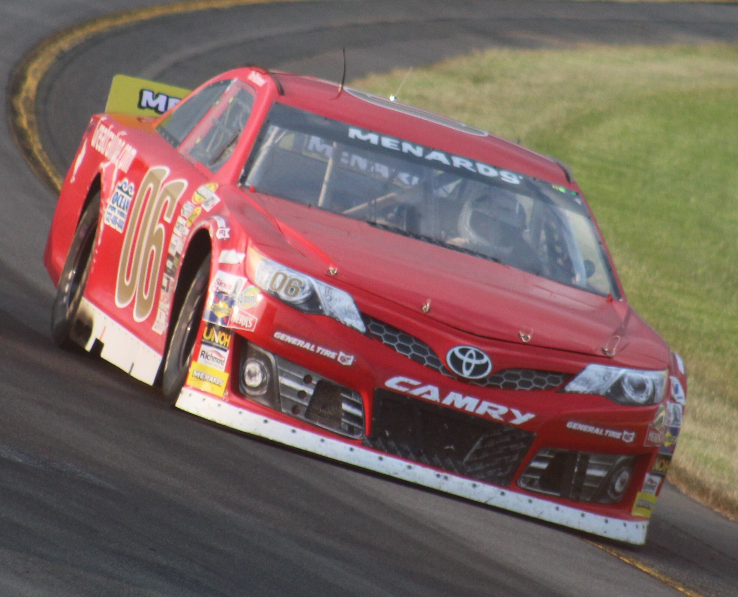 2019 Pocono 400